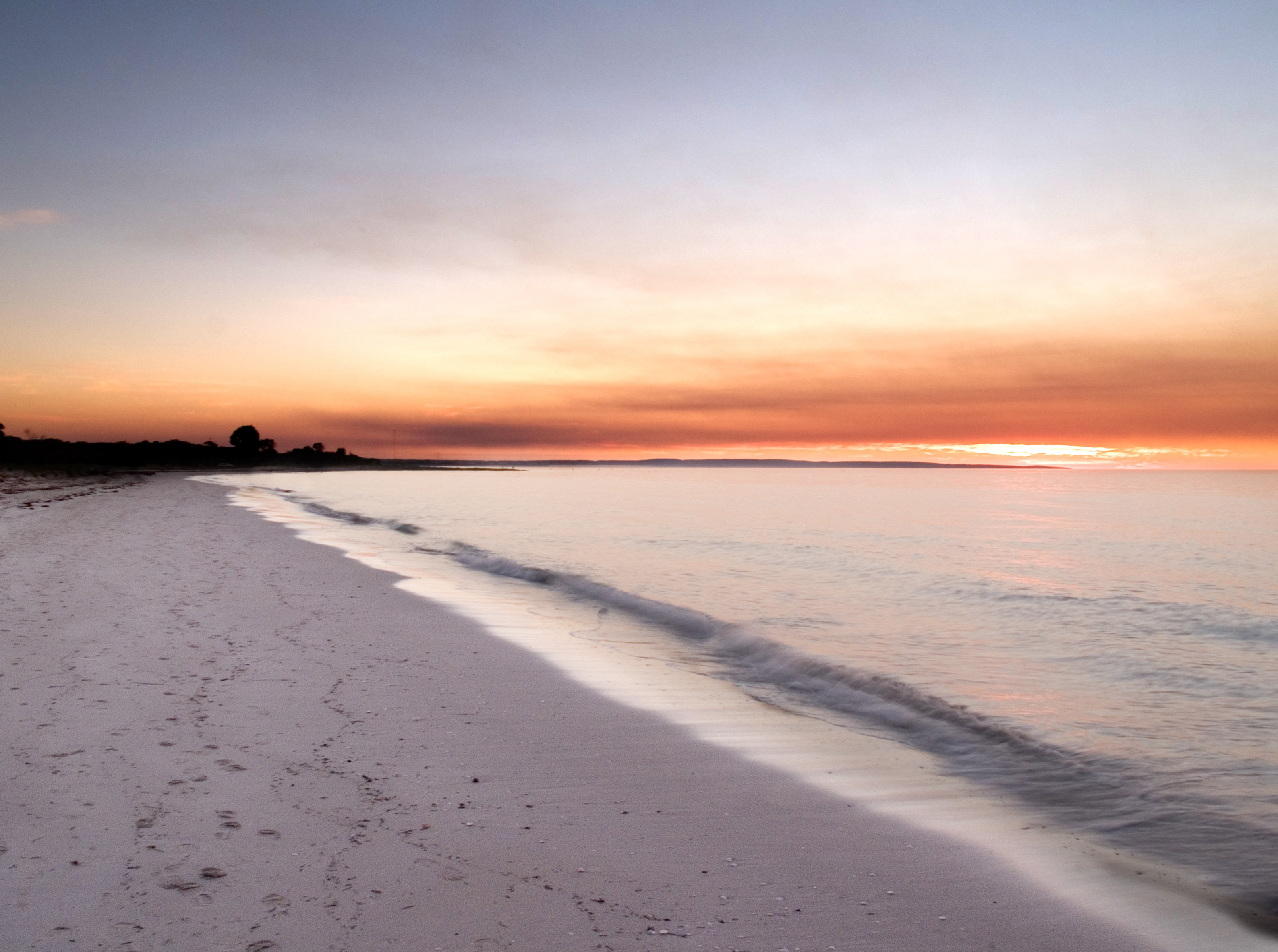 Taken by user Hossen27